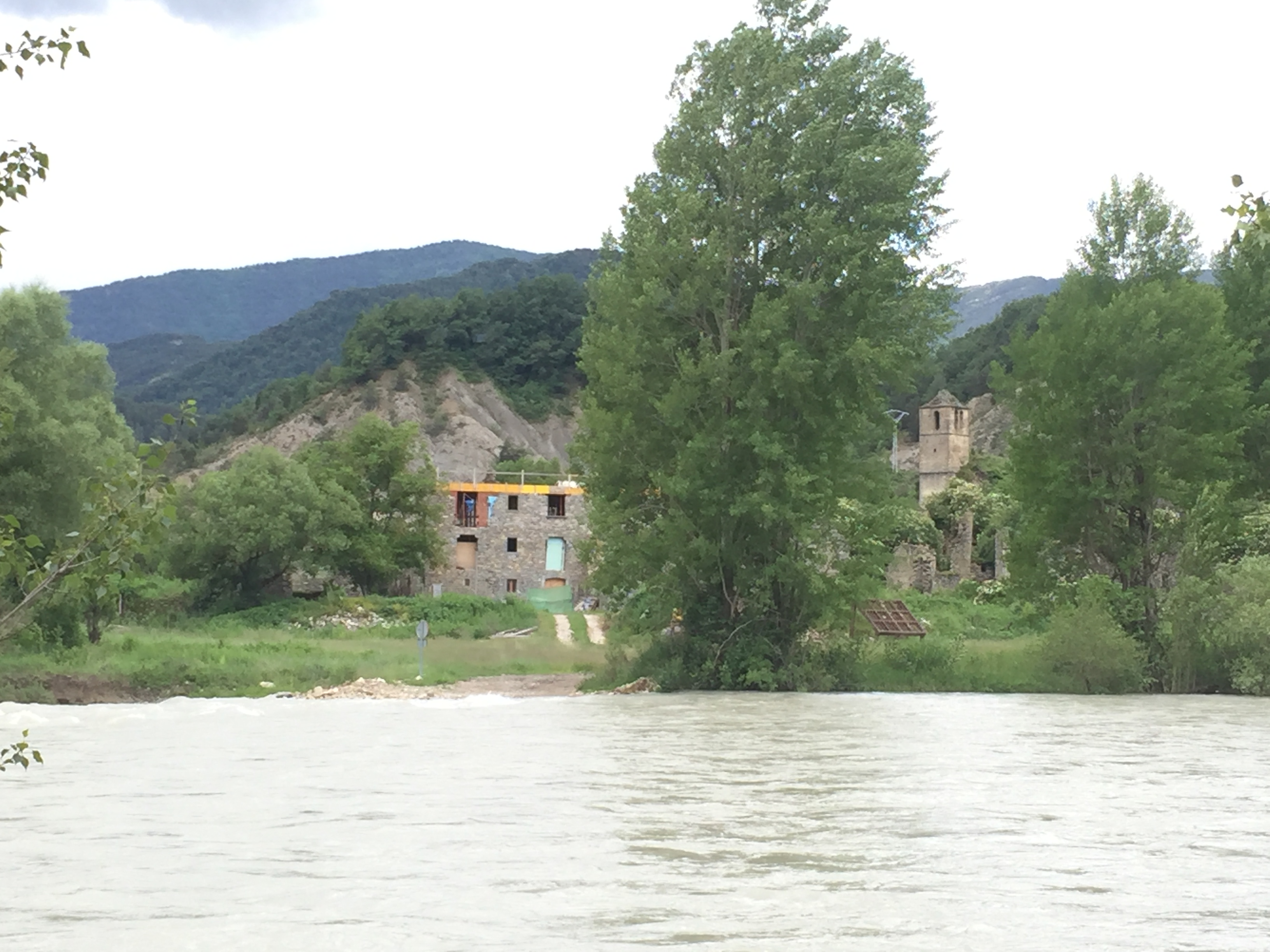 Rio Ara a su paso por la localidad de Janovas. Fiscal (Huesca)